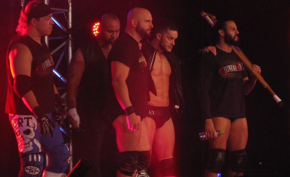 9月29日 神戸大会 「DESTRUCTION」 BULLET CLUB入場